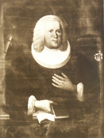 Portrait de johann wilhelm meyer (1690-1767)